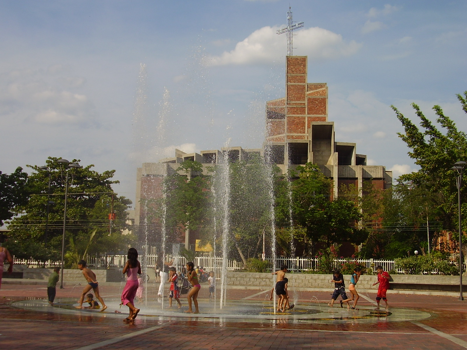 Niños bañandose en el parque Bolivar